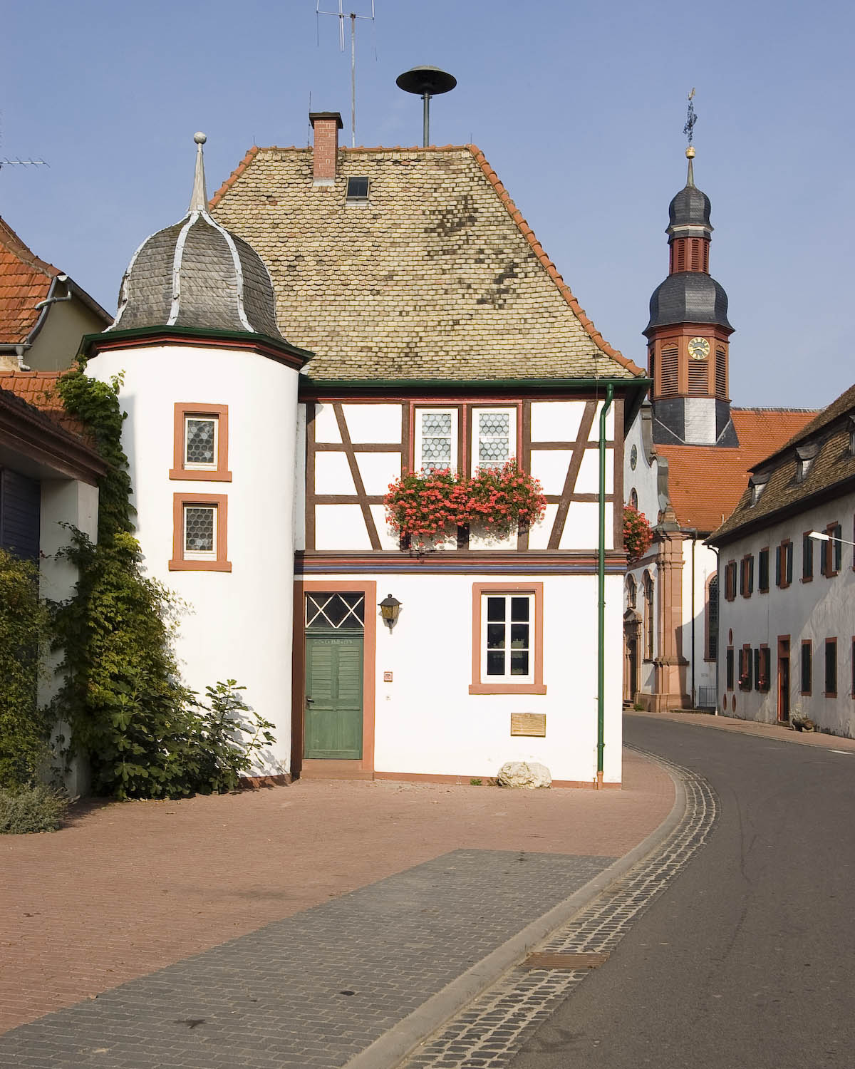 Rathaus in Mettenheim. Blick in Richtung Norden mit der ev. Kirche im Hintergrund.